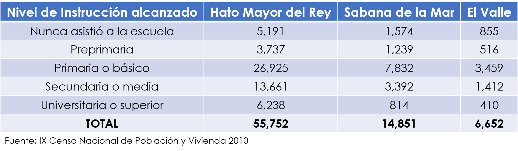 Esta tabla contiene información de la educación poblacional de la provincia Hato Mayor. Fuente: IX Censo Nacional de la Población y Vivienda 2010